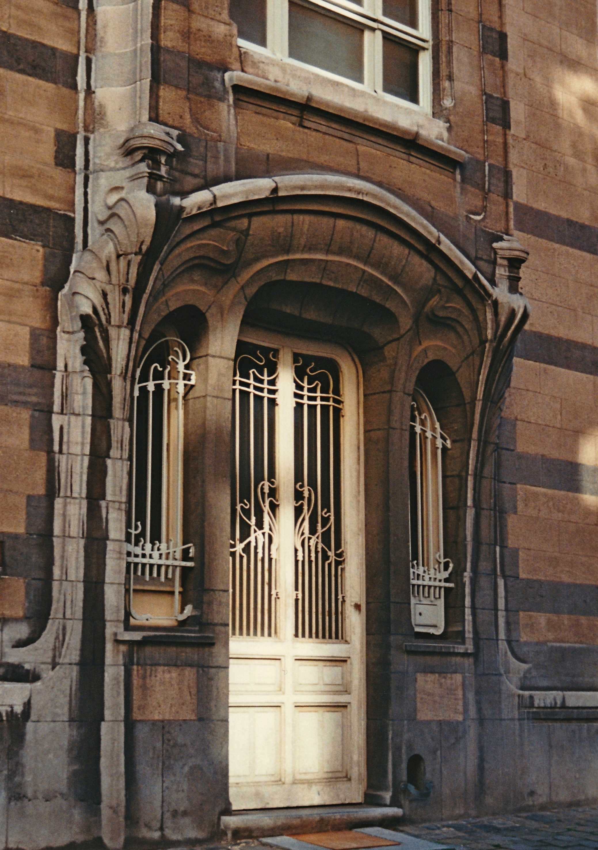 Belgique - Bruxelles - Hôtel Deprez-Van de Velde (Art nouveau, architecte Victor Horta, 1895-1896)